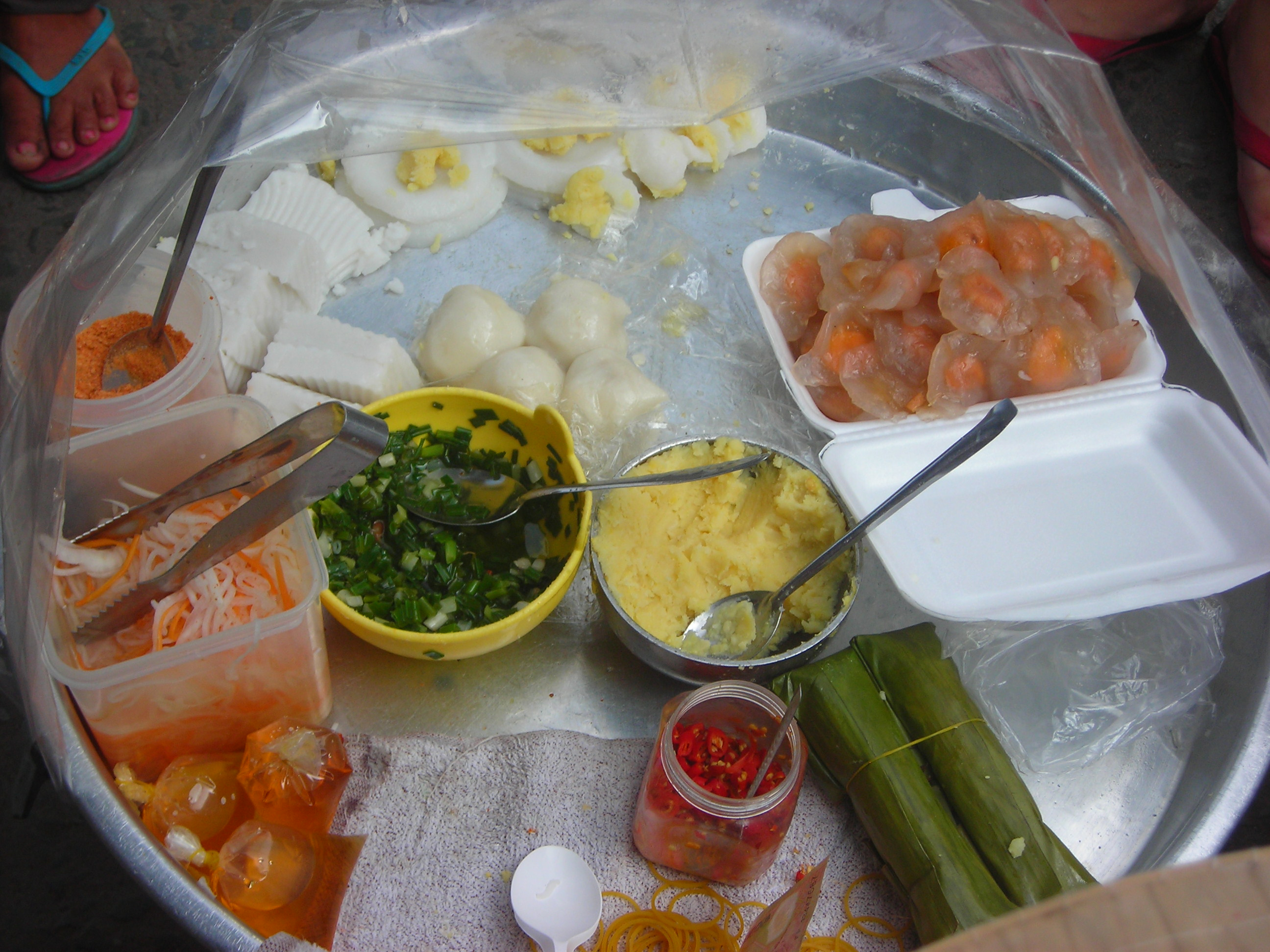 Plateau des bánhs et ingrédients